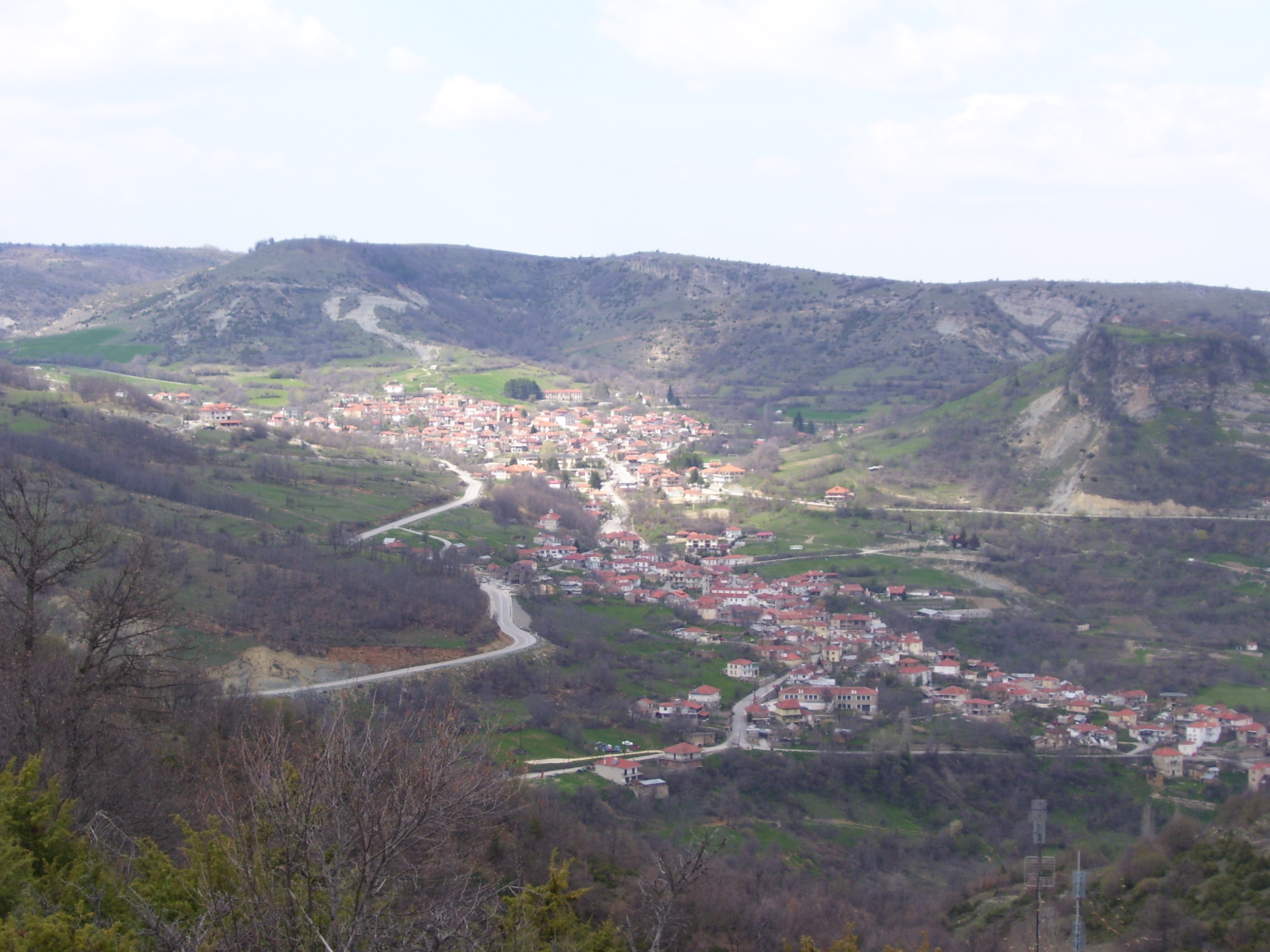 Село Нестрам (Горно и Долно, на гръцки Несторио, Ано и Като), снимано от планината Горуша (Войо), Егейска Македония, Костурско, Гърция.